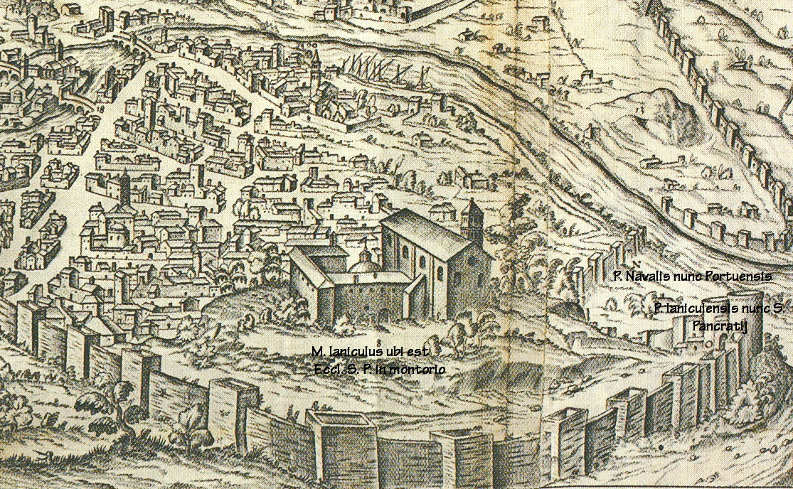 Urbis Roma descriptio von Hugues Pinard 1555; Ausschnitt Gianicolo mit San Pietro in Montorio